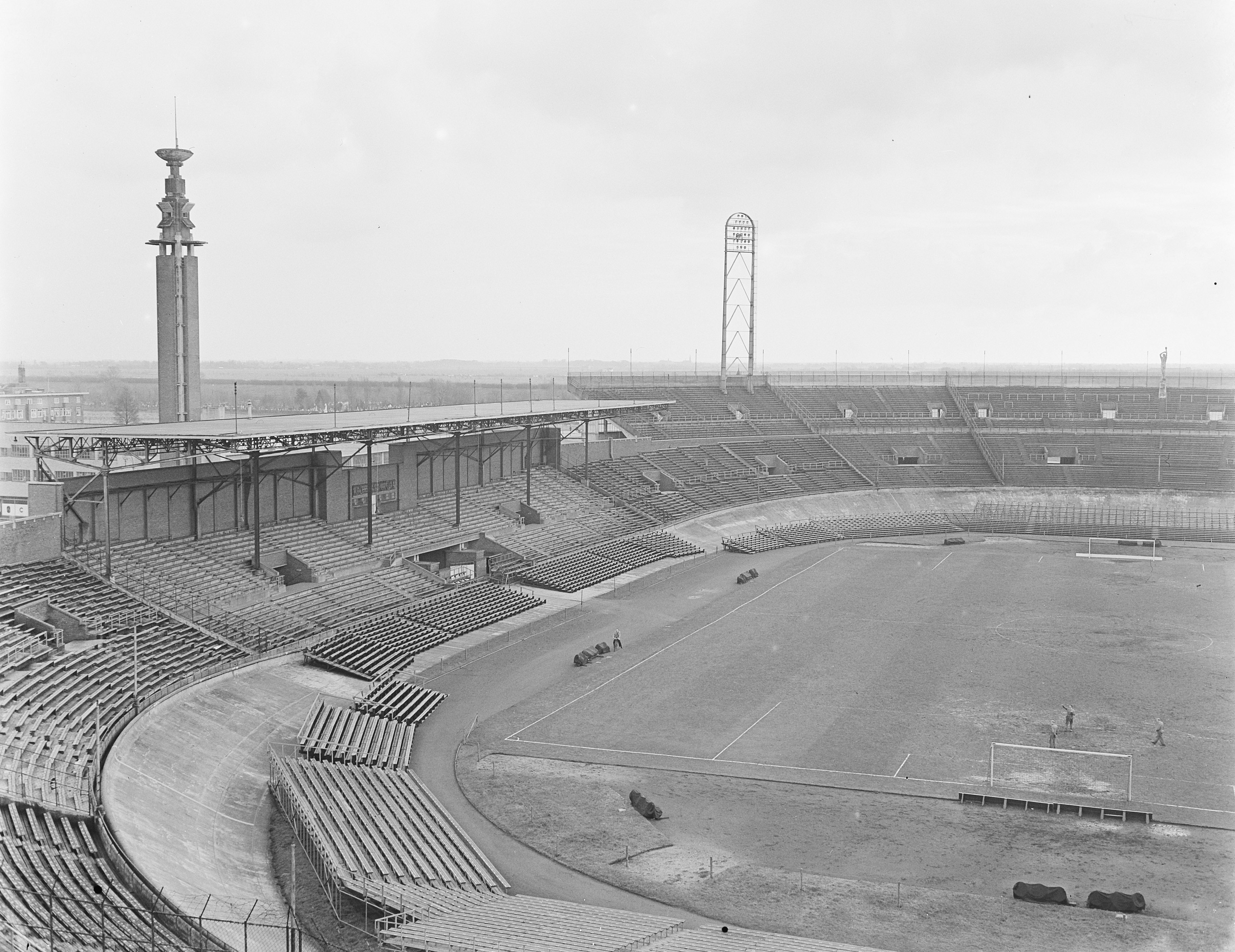 Collectie / Archief : Fotocollectie Anefo Reportage / Serie : [ onbekend ] Beschrijving : Overzichten Olympisch Stadion Amsterdam Datum : 22 januari 1954 Trefwoorden : OVERZICHTEN Instellingsnaam : Olympisch Stadion Fotograaf : Rossem, Wim van / Anefo Auteursrechthebbende : Nationaal Archief Materiaalsoort : Glasnegatief Nummer archiefinventaris : bekijk toegang 2.24.01.09 Bestanddeelnummer : 906-2648